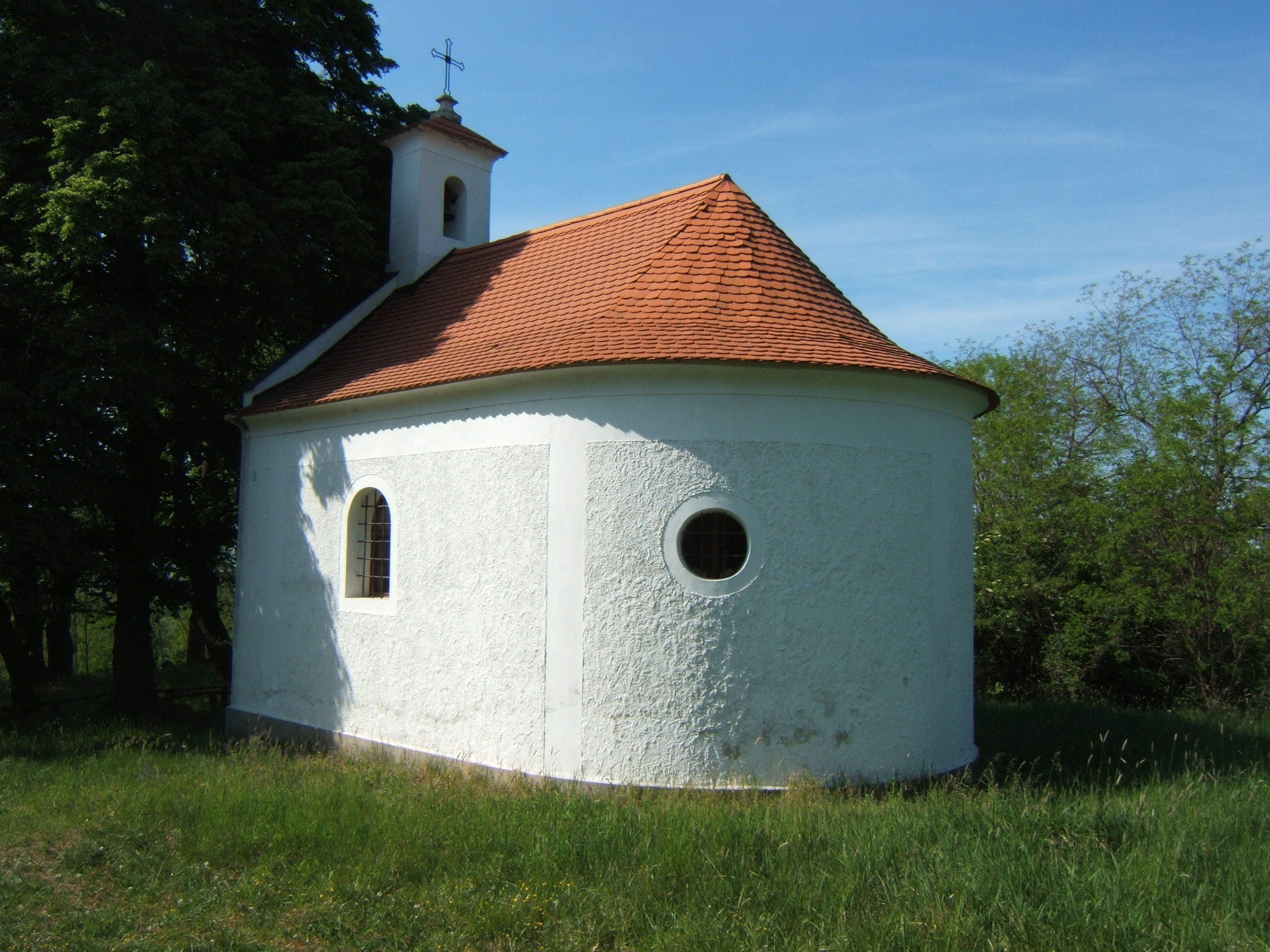 Hollád, Szent Donát-kápolna